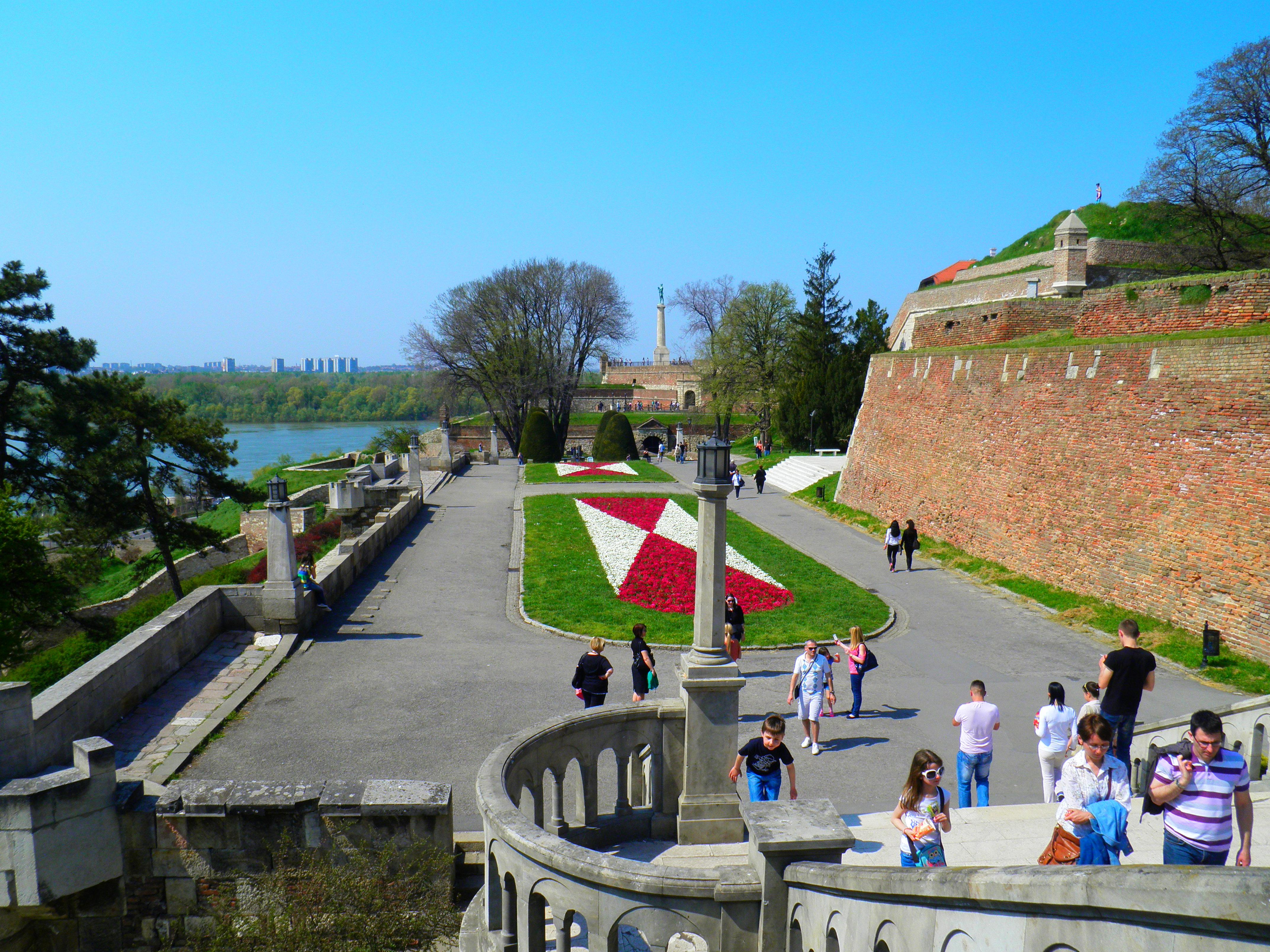 Kalemegdan